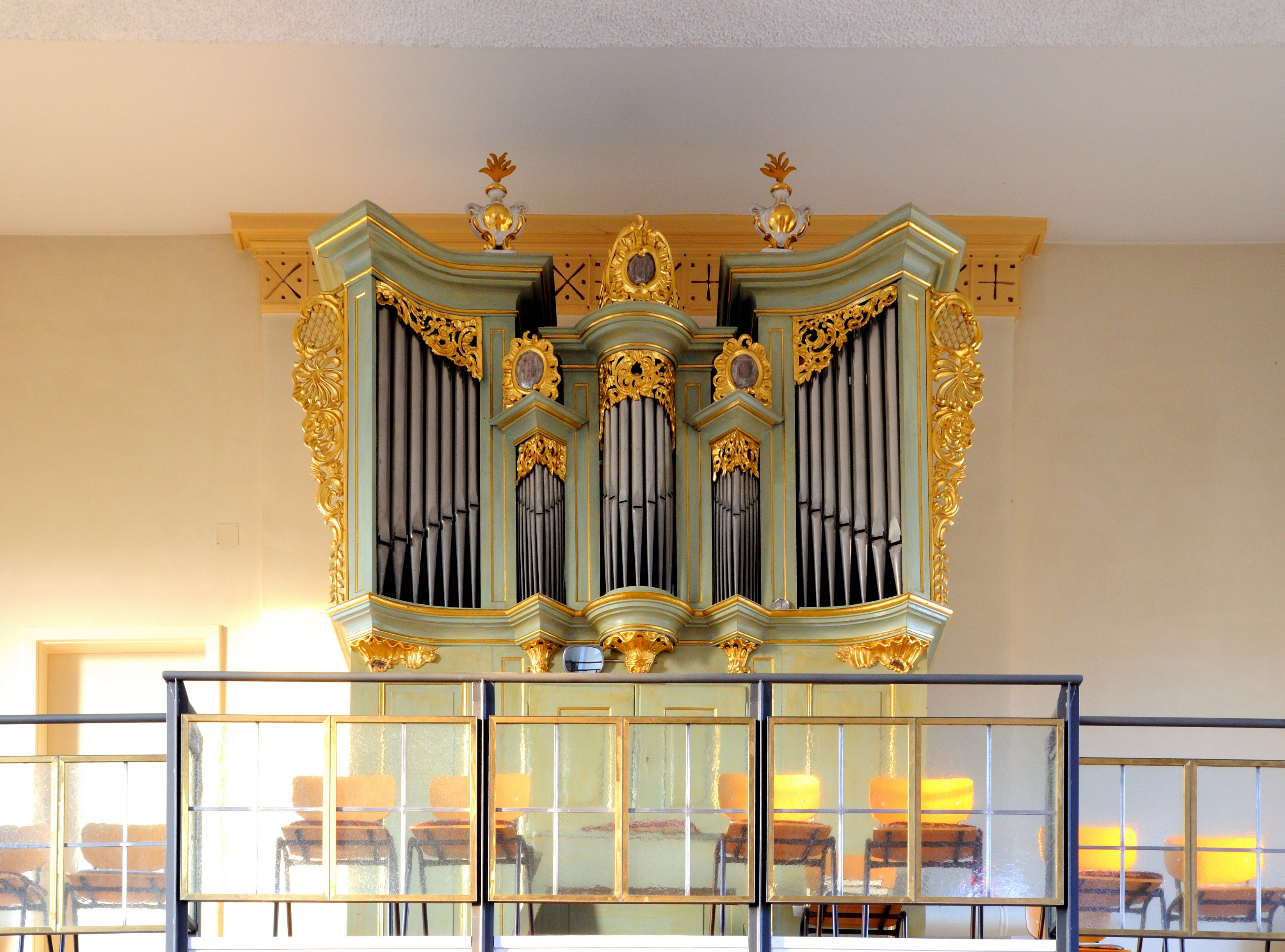 Kandern-Feuerbach: Kirche, Orgel